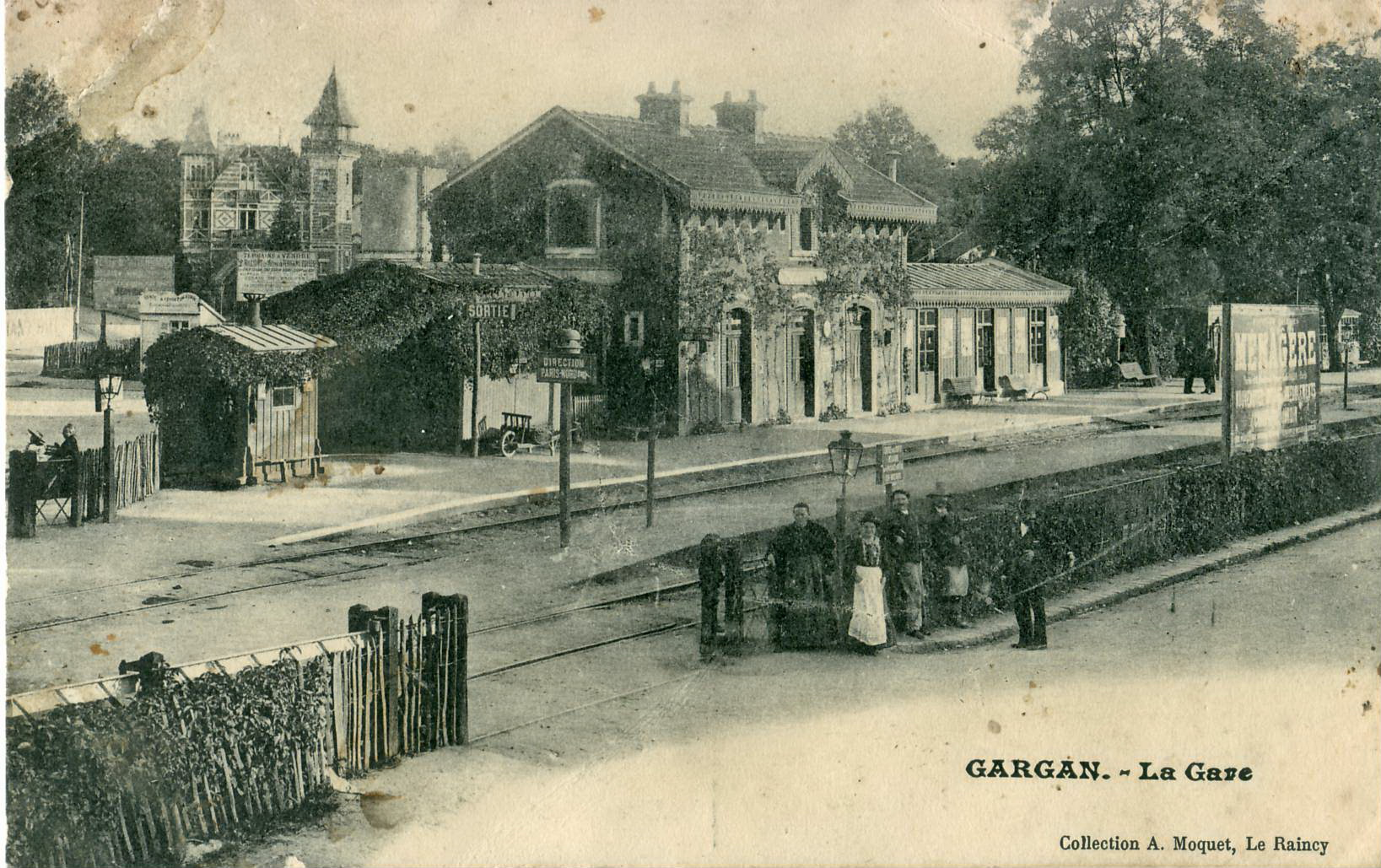 Carte postale ancienne éditée par A. Moquet au Raincy : GARGAN : La GareIl s'agit de la première gare de Gargan, celle de 1875